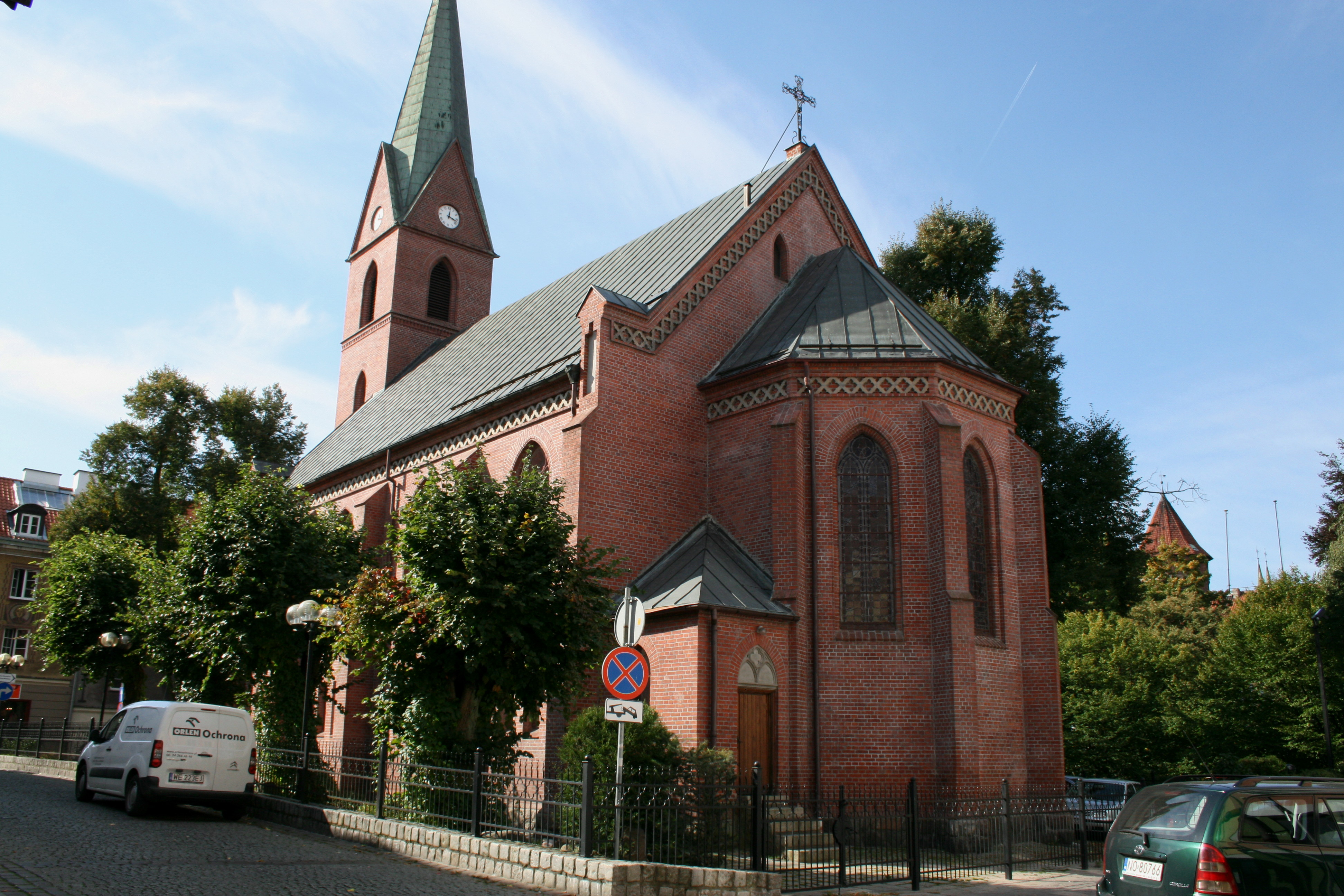 Olsztyn, ul. Zamkowa - kościół ewangelicko-augsburski p.w. Chrystusa Zbawiciela, 1876-1899